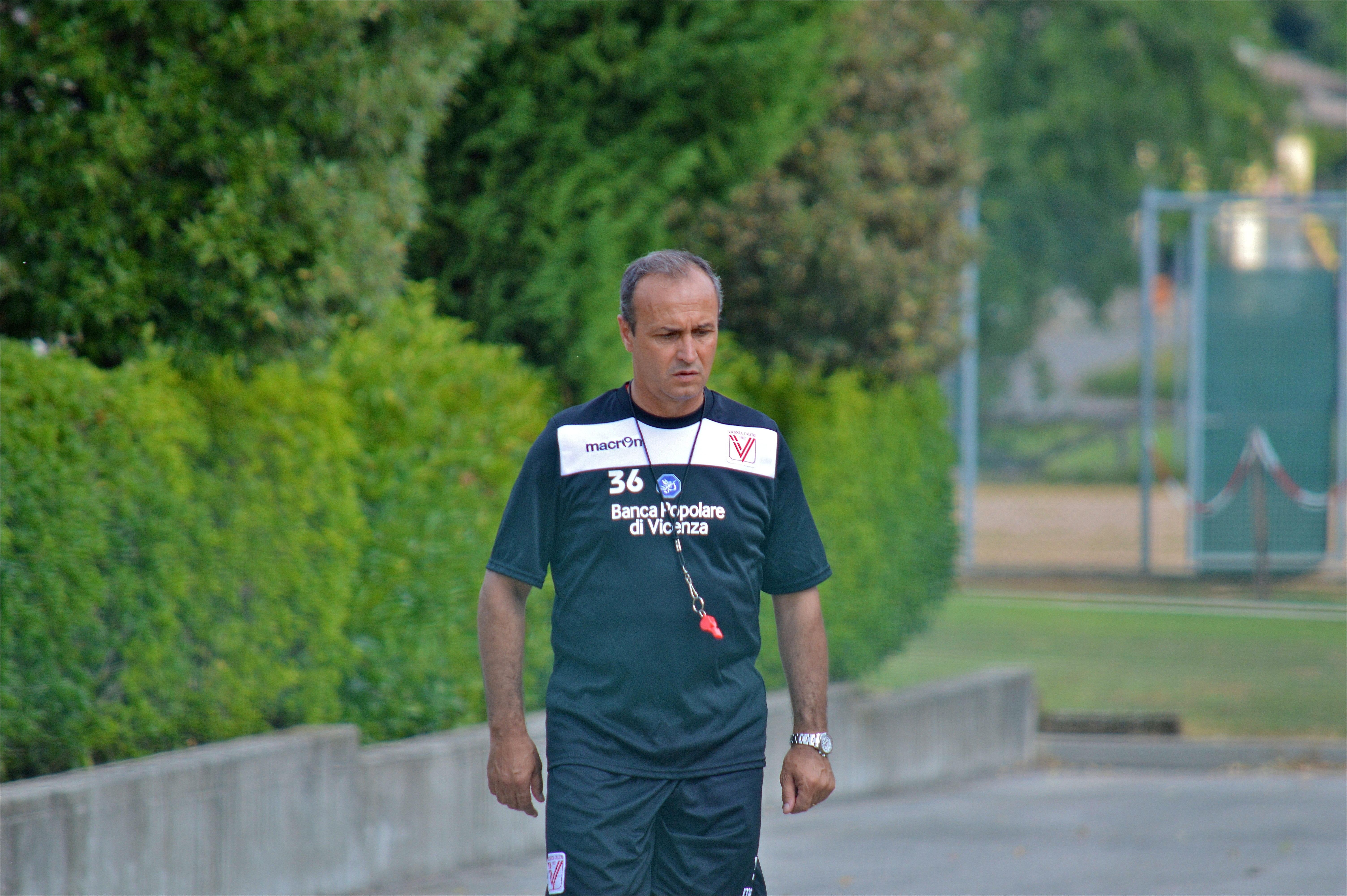 L'allenatore Pasquale Marino al Vicenza